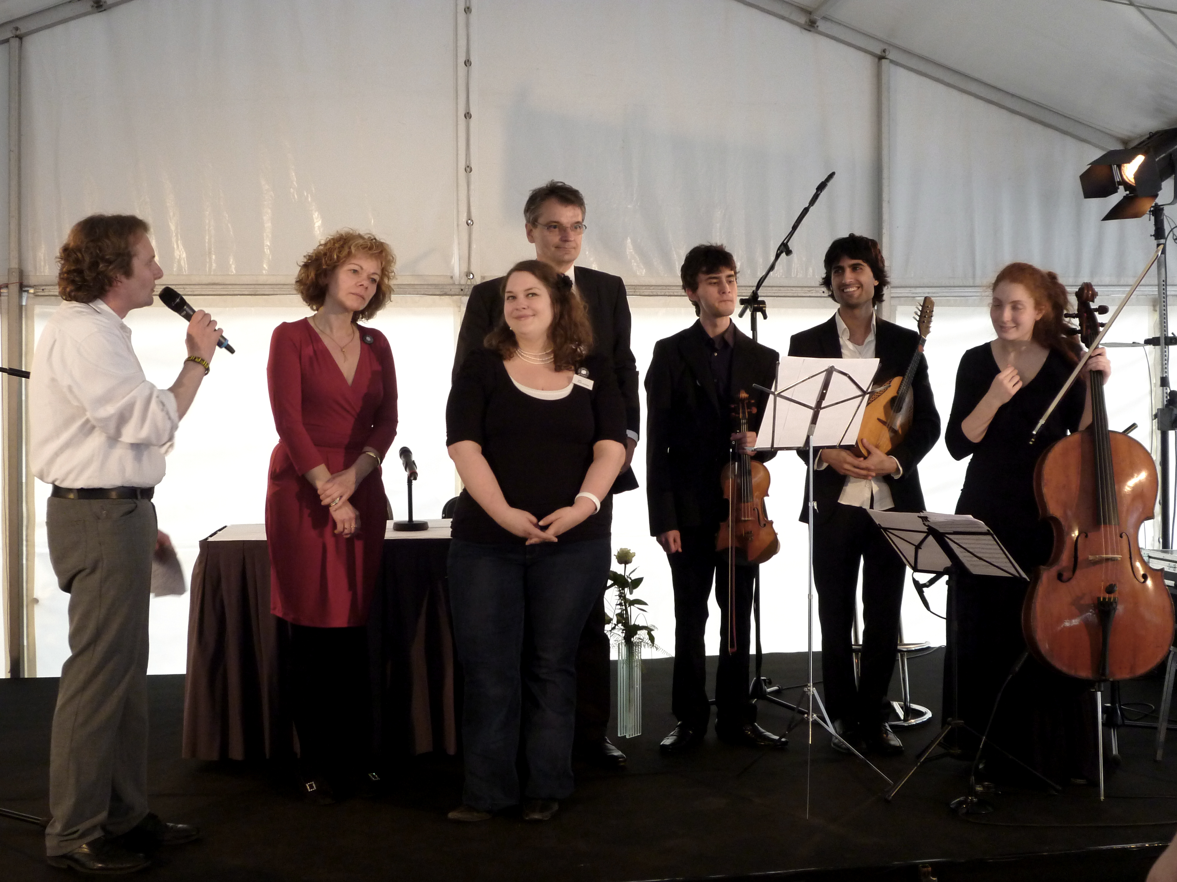 Gedenkveranstaltung zum 79. Jahrestag der Bücherverbrennungen in Hannover. Unter der Erkenntnis "... dort, wo man Bücher verbrennt, verbrennt man am Ende auch Menschen" fanden durch die Inititative "Hannover im Wort" verschiedene Veranstaltungen statt, darunter die am Opernplatz mit Lesungen verfolgter Autoren bzw. von Ihnen verbrannter Bücher. Von links: Marc Beinsen, Corinna Luedtke, Julia Berlit-Jackstien, Karljosef Kreter, David Strongin, Alon Sariel, Shiri Tintpulver.